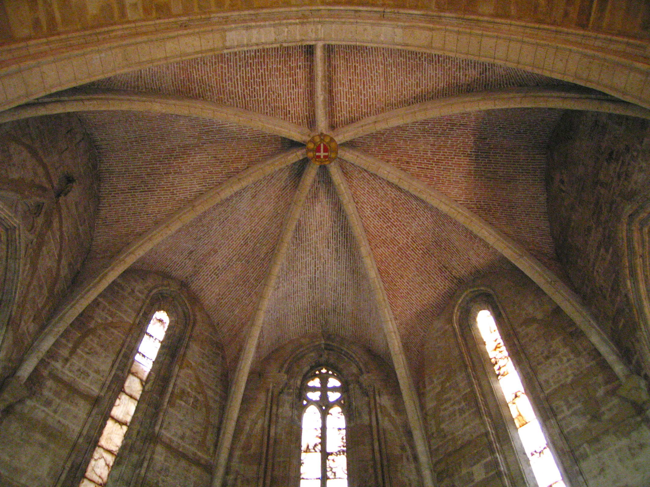 Sant Joan de l'Hospital (València). Testa interior